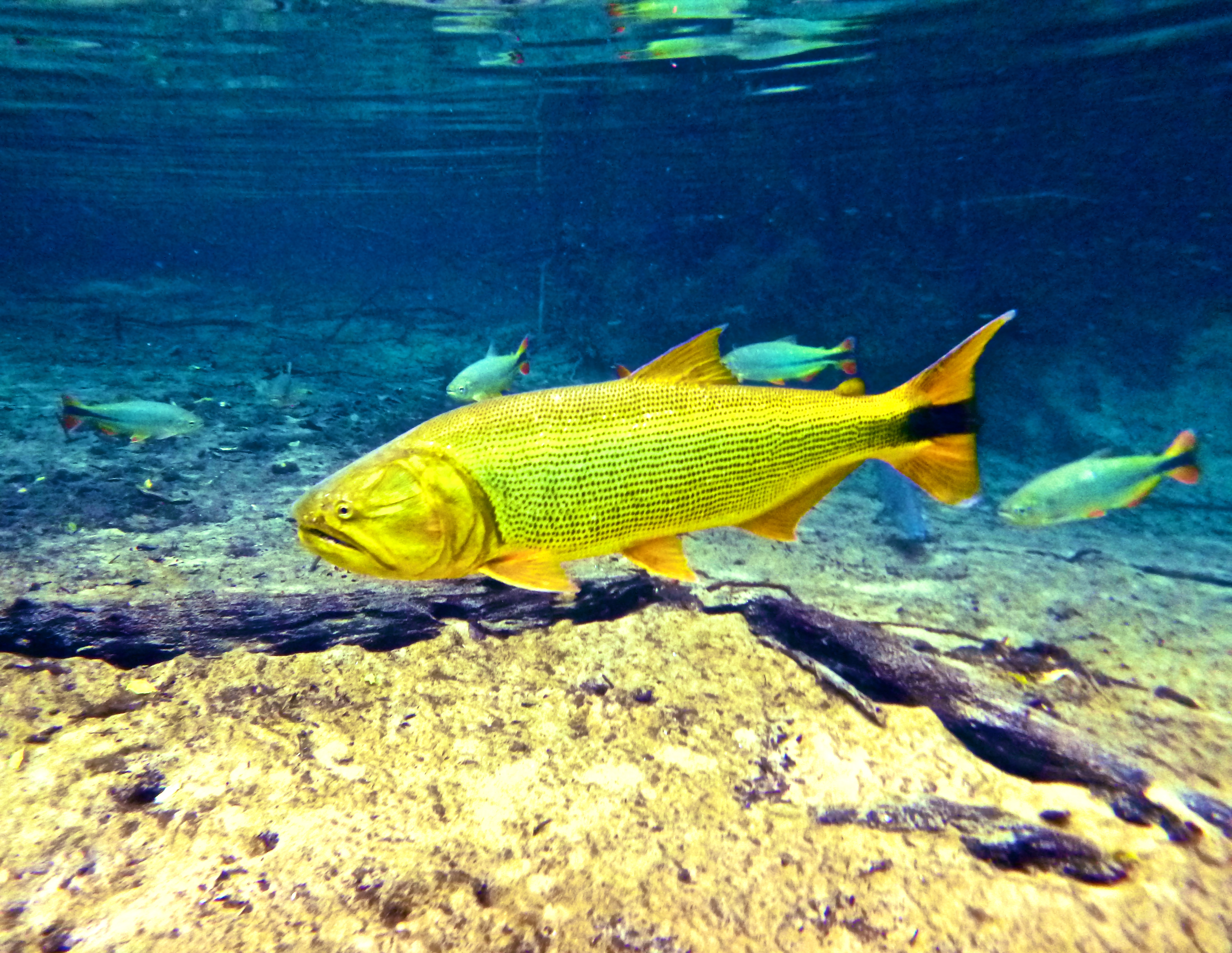 Nascente do rio da Prata em Bonito (MS)